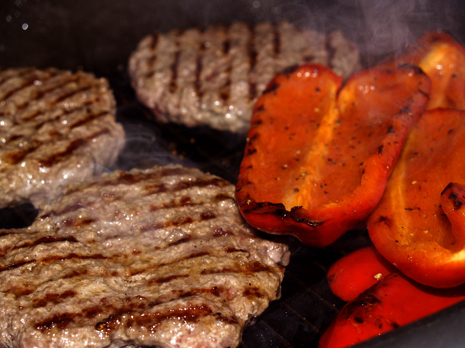 Hakkebøffer med rød peber